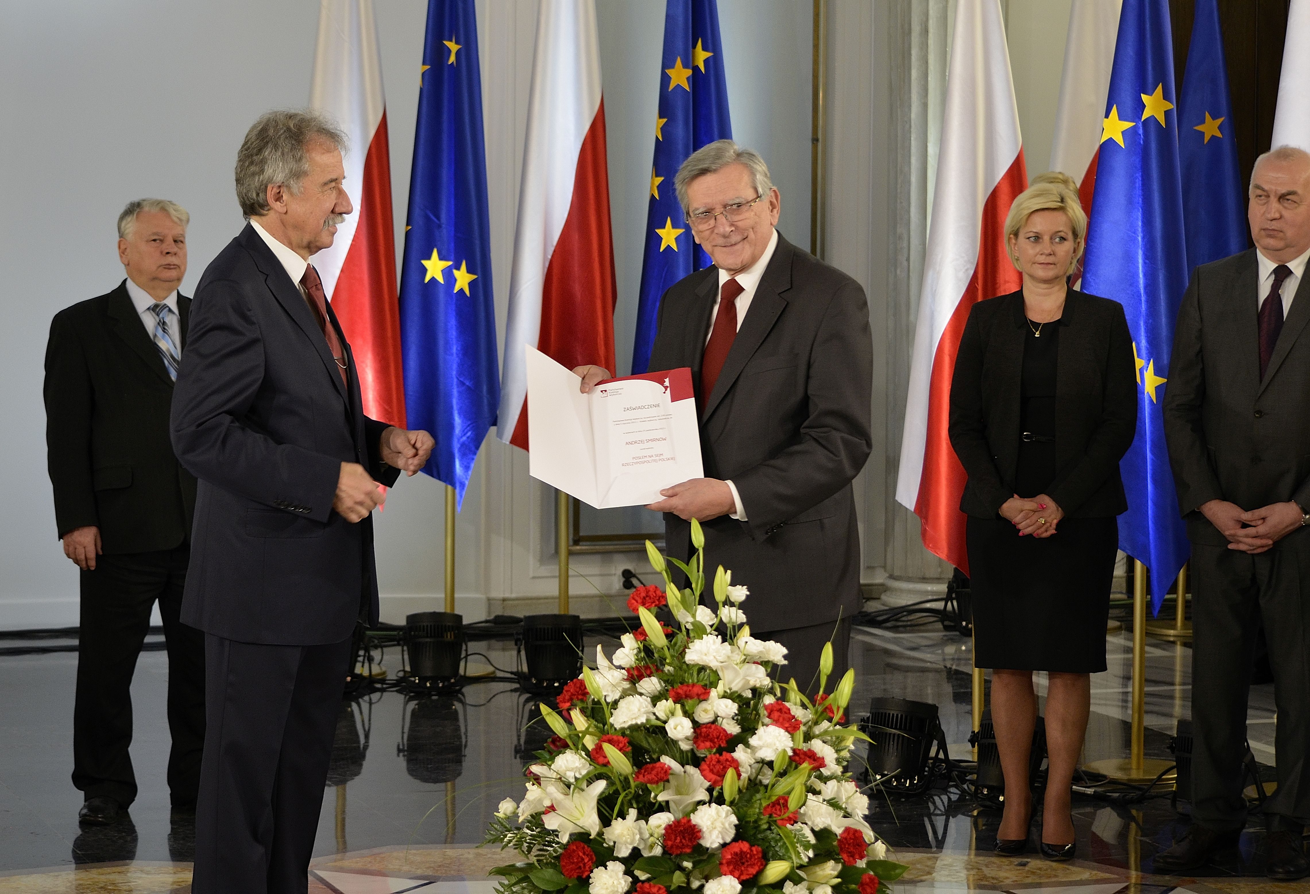 Poseł Andrzej Smirnow podczas uroczystości wręczenia zaświadczeń o wyborze nowo wybranym posłom w Sali Kolumnowej Sejmu